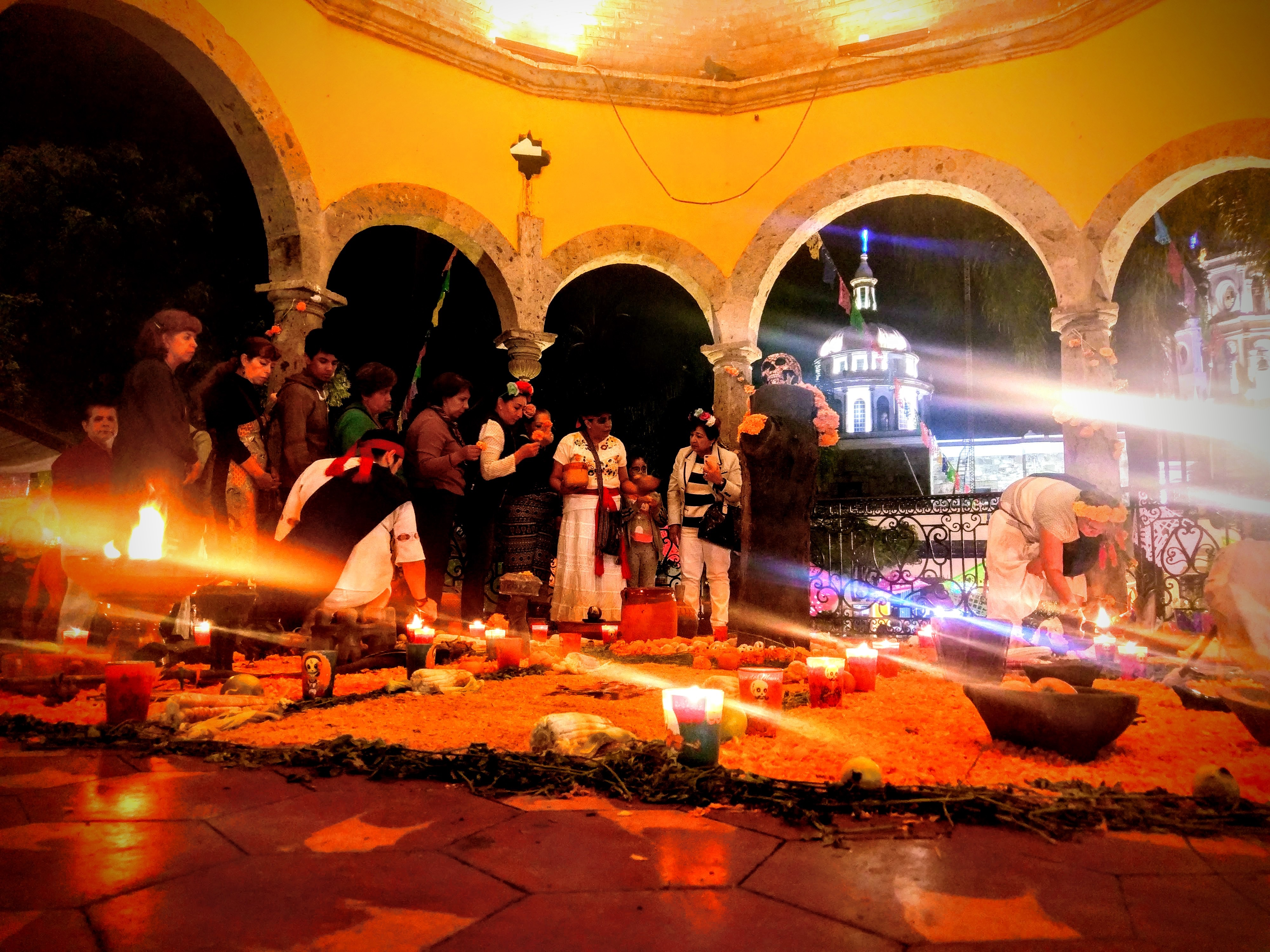 El Día de los Muertos se celebra el 2 de noviembre para recordar a amigos y familiares que se han adelantado al Mictlan. Esta celebración es milenaria. El pueblo azteca y otras civilizaciones mesoamericanas veían a la muerte como una extensión de la vida. En vez de temerla, la celebraban. Este concepto ha pasado de generación en generación.